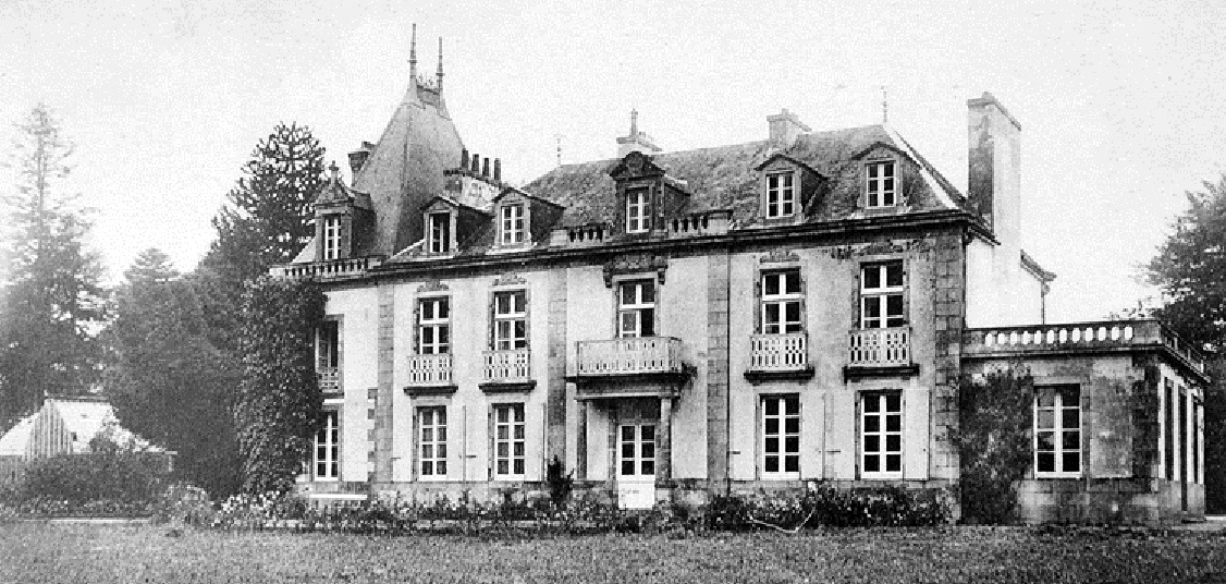 Plougourvest : le château de Kervoanec au début du XXème siècle (reconstruit pendant le deuxième quart du XIXème siècle ; transformé désormais en EHPAD (Etablissement d'hébergement pour personnes âgées dépendantes)